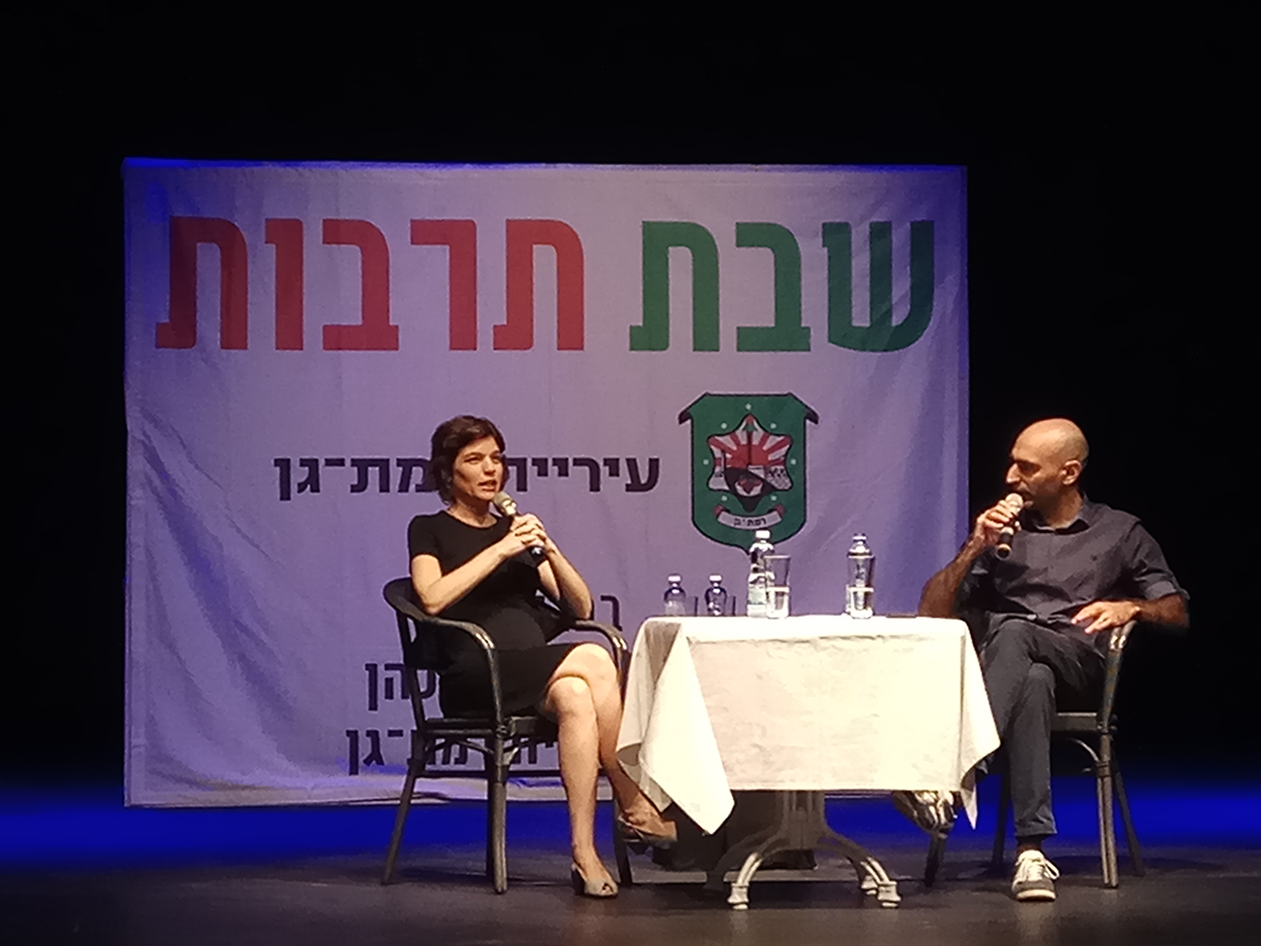 ח"כ תמר זנדברג באירוע שבתרבות ברמת גן עם אסף ליברמן